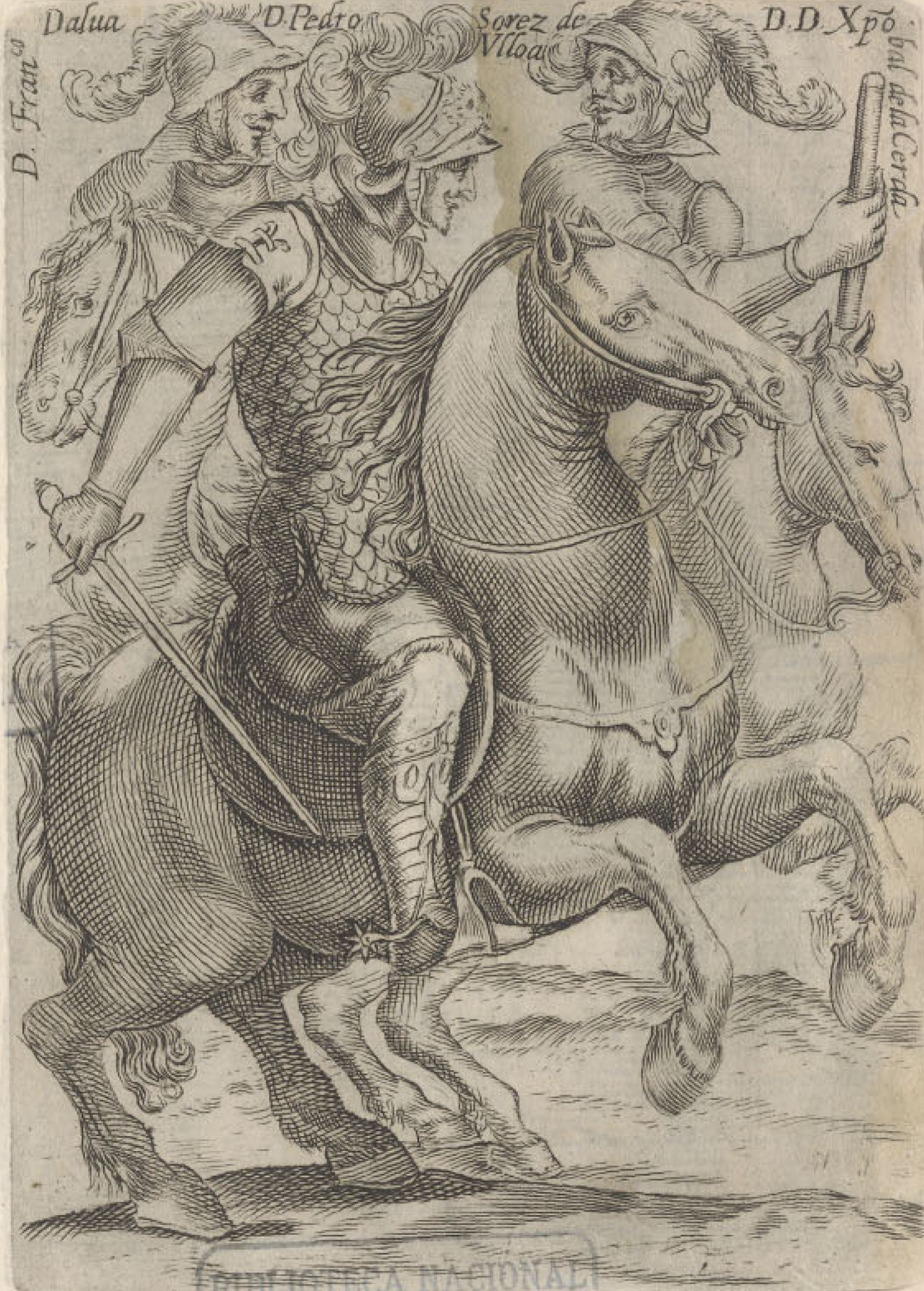 Francisco de Alava, Pedro Osores de Ulloa y Cristóbal de la Cerda: spaniards governators of Chile // gobernadores españoles de Chile